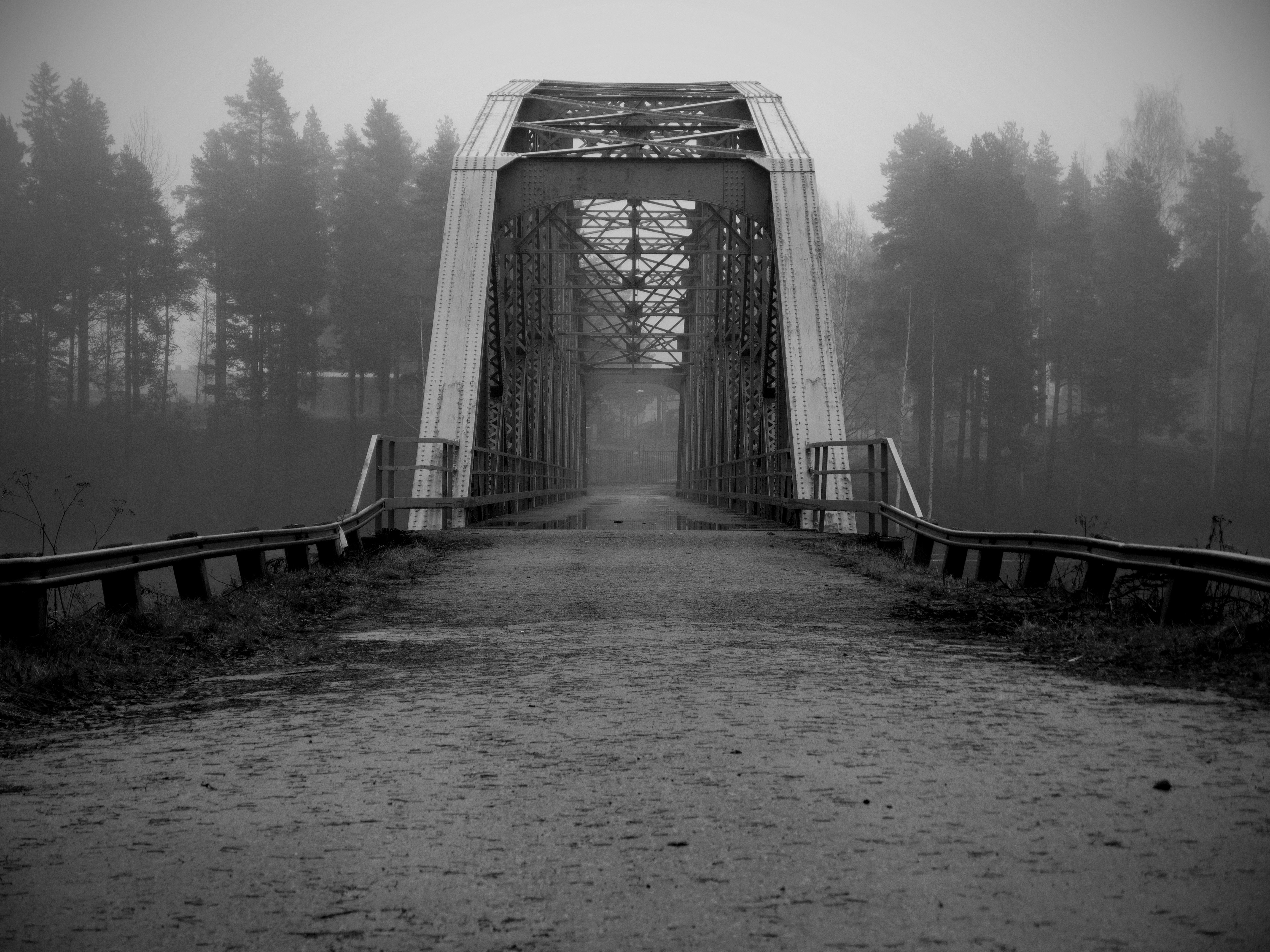 Hedenbron i boden strax uppströms bodens vattenkraftverk, 2012.